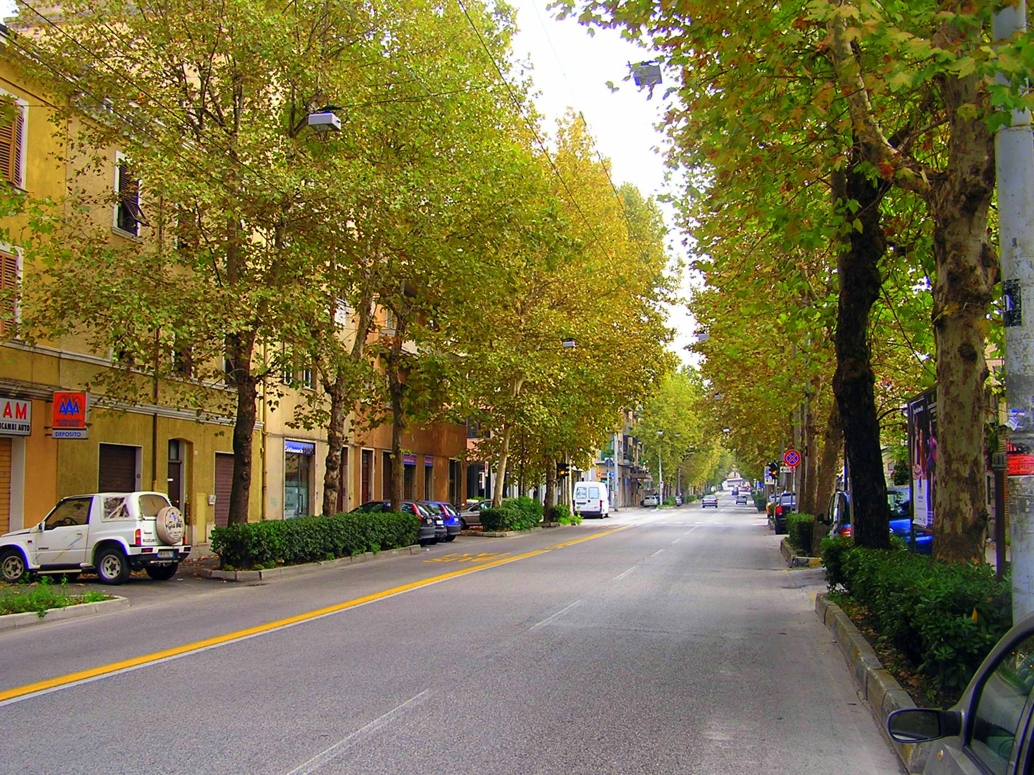 Viale Giordano Bruno (Ancona)